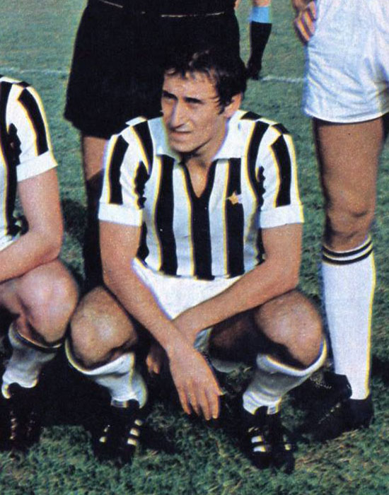 Verona, stadio Marcantonio Bentegodi, 11 ottobre 1970. Il calciatore italiano Giuseppe Furino alla Juventus, prima dell'inizio della sfida sul campo del Verona (0-0) valevole per la 3ª giornata del campionato italiano di Serie A 1970-71.